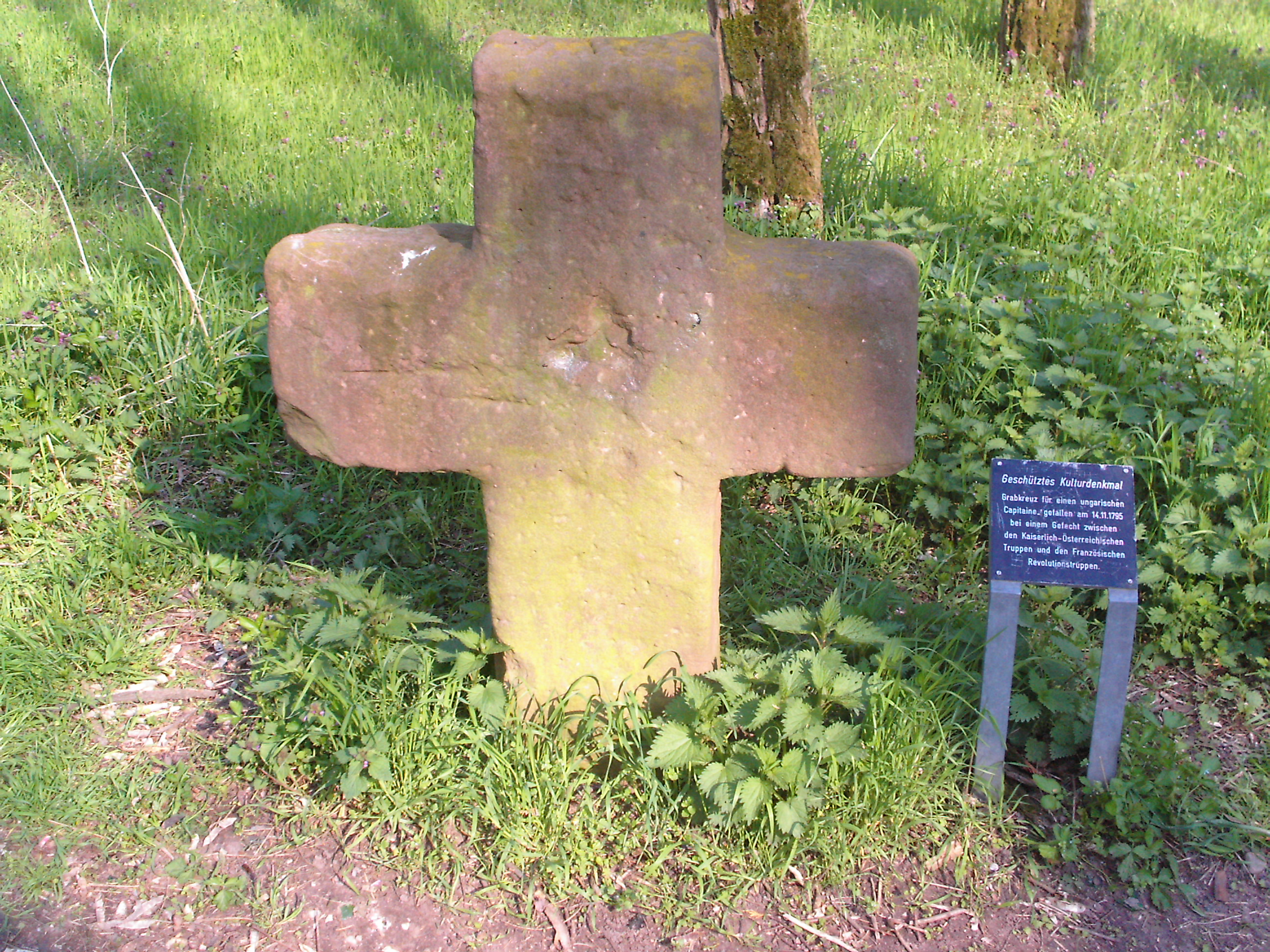 67245 Lambsheim, Deutschland, Pfalz, Kreuz auf dem Schlachtfeld